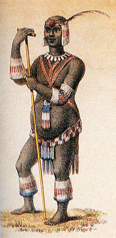 le roi Zoulou Dingane kaSenzangakhona